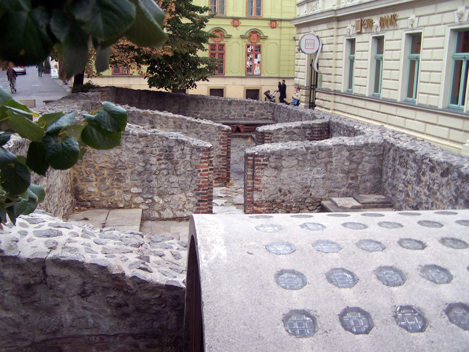 volt török fürdő (Pécs, Ferencesek utcája (volt Sallai u.))